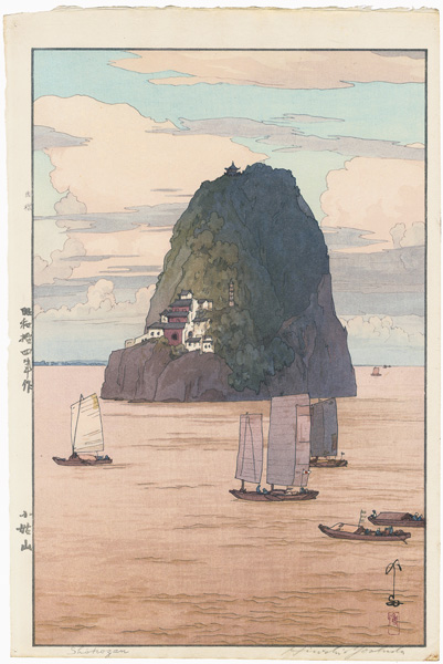 吉田博作木版画